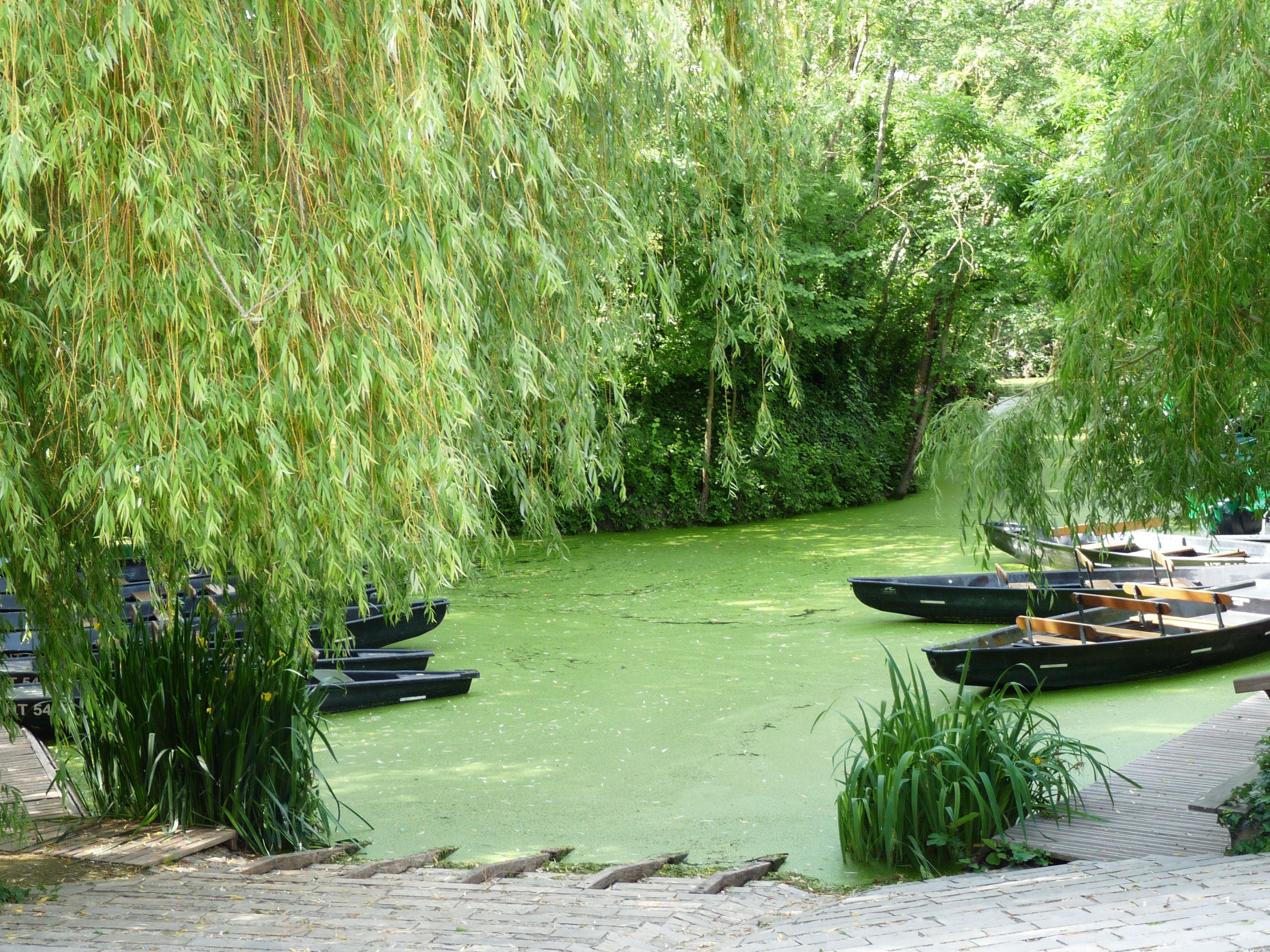 Embarcadère du Vieux Port de Maillezais (Vendée, France).